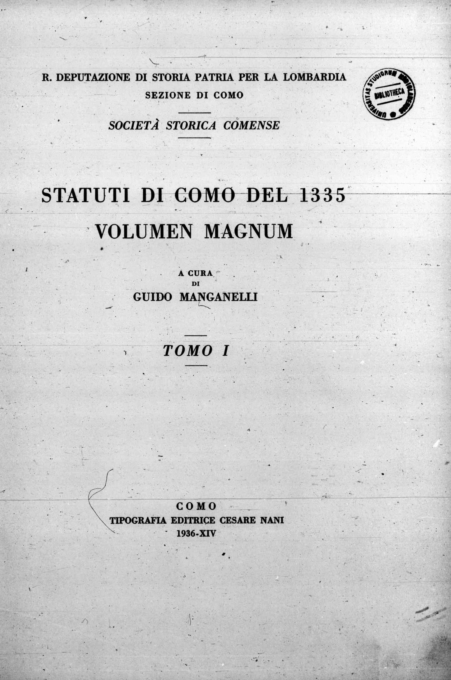 Frontespizio